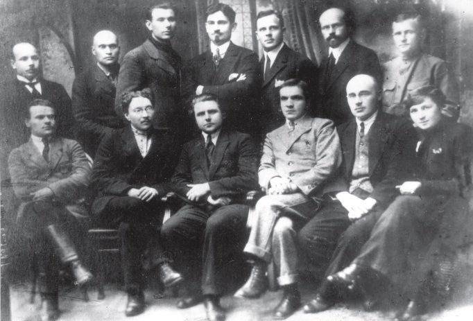 Фракцыя Беларускай партыі сацыялістаў-рэвалюцыянераў Першай агульнанацыянальнай палітычнай канферэнцыі ў Празе. Другі справа сядзіць Сцяпан Жабінскі. Верасень 1921